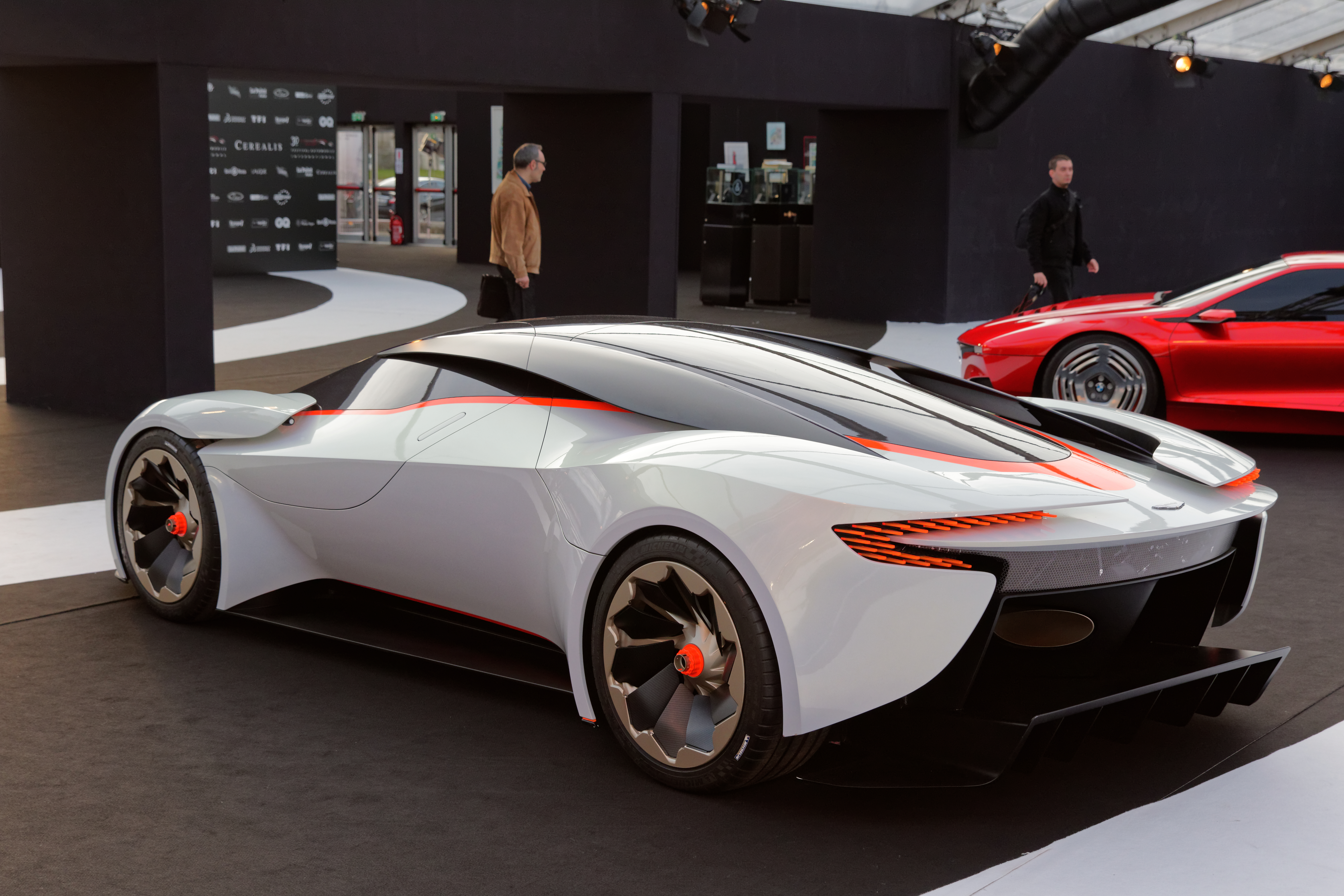 L'Aston Martin DP 100 Vision Gran Turismo exposée lors du festival automobile international 2015.